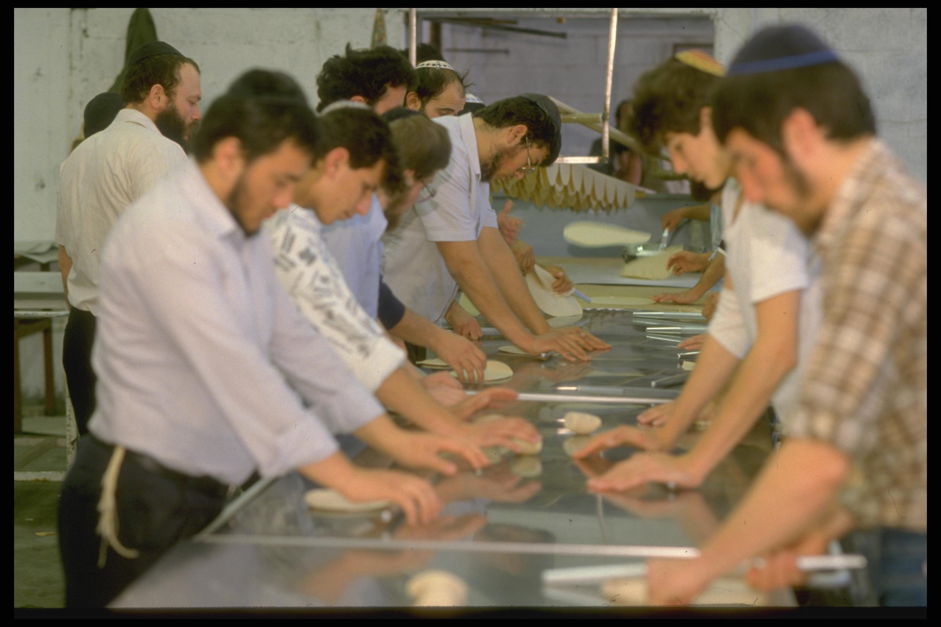 BAKING MATZOT AT KFAR CHABAD, IN PREPARATION FOR THE PASSOVER HOLIDAY. אפיית מצות בכפר חבד כחלק מההכנות לחג הפסח Photo: HARNIK NATI, 03/02/1987